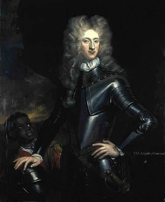 circa 1700 date QS:P,+1700-00-00T00:00:00Z/9,P1480,Q5727902